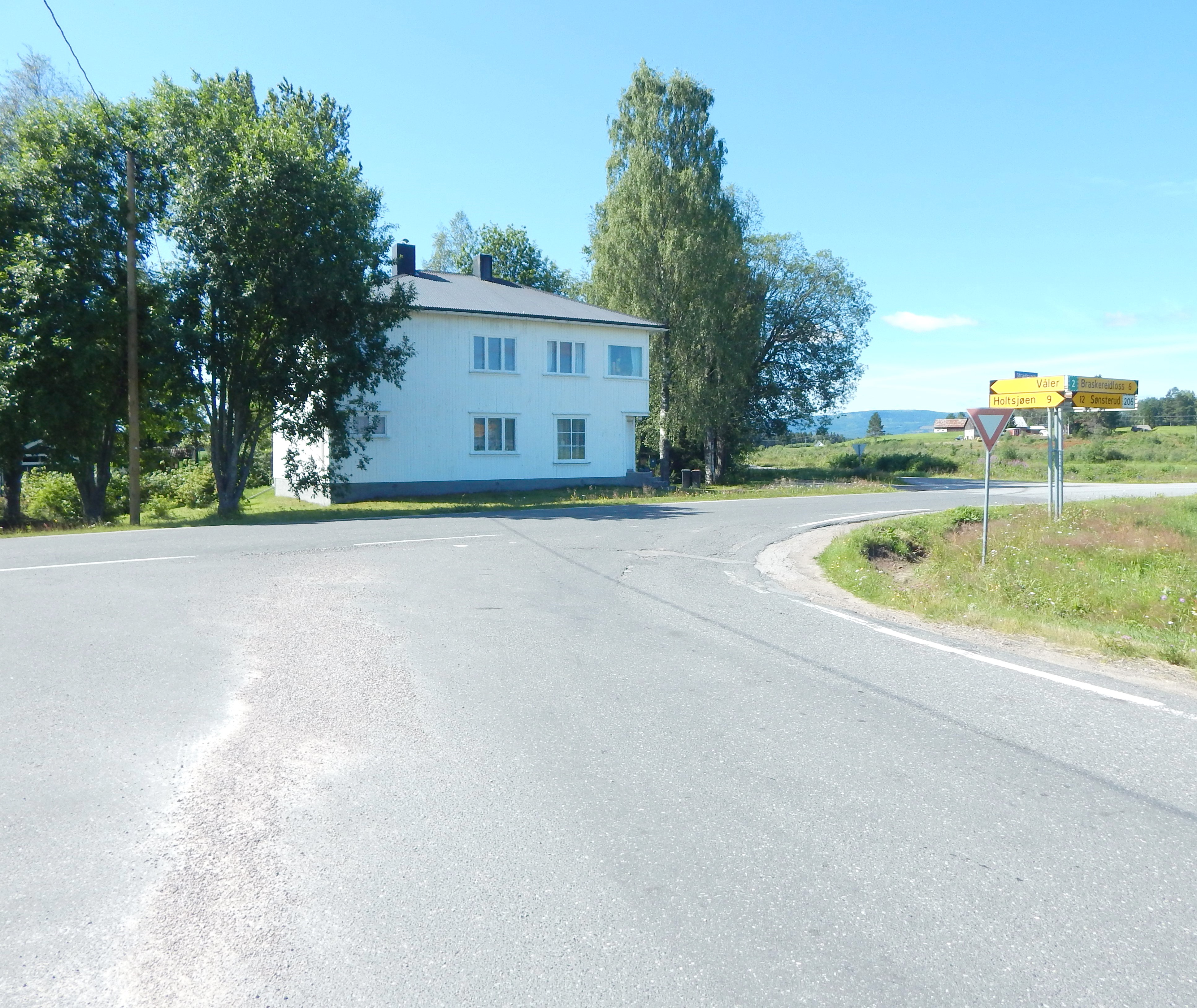 Fylkesvei 496 krysser fylkesvei 455 i et skrått kryss.